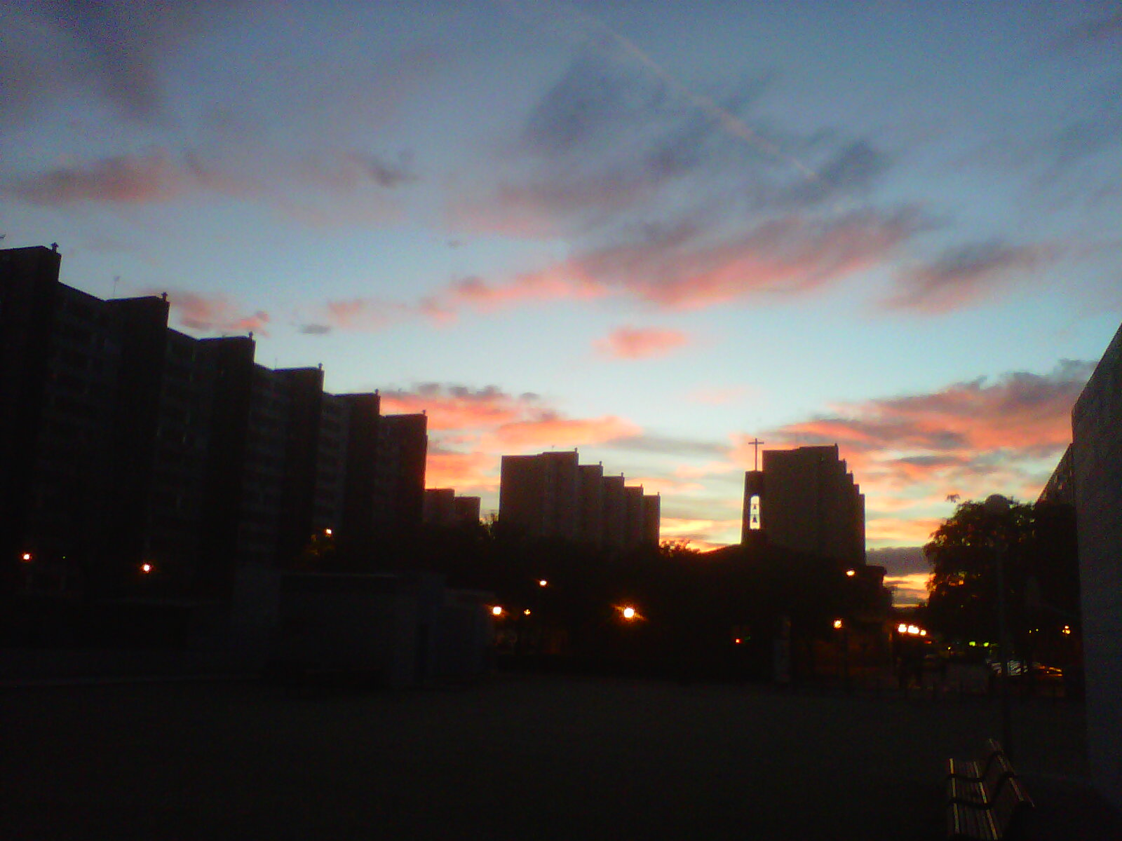 puesta de sol desde un terrado de Bellvitge